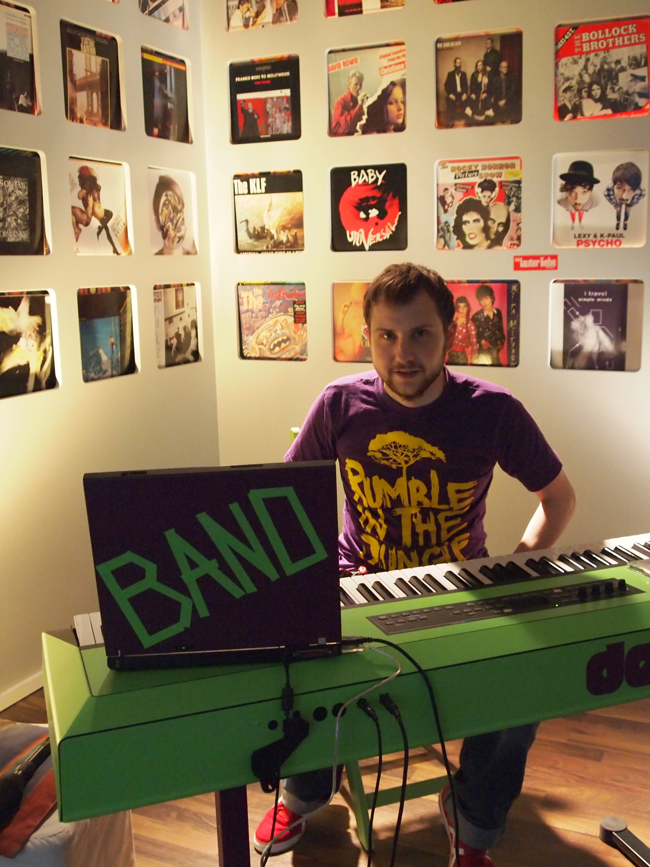 DER POLAR bei Yalagoo in Berlin, im September 2011